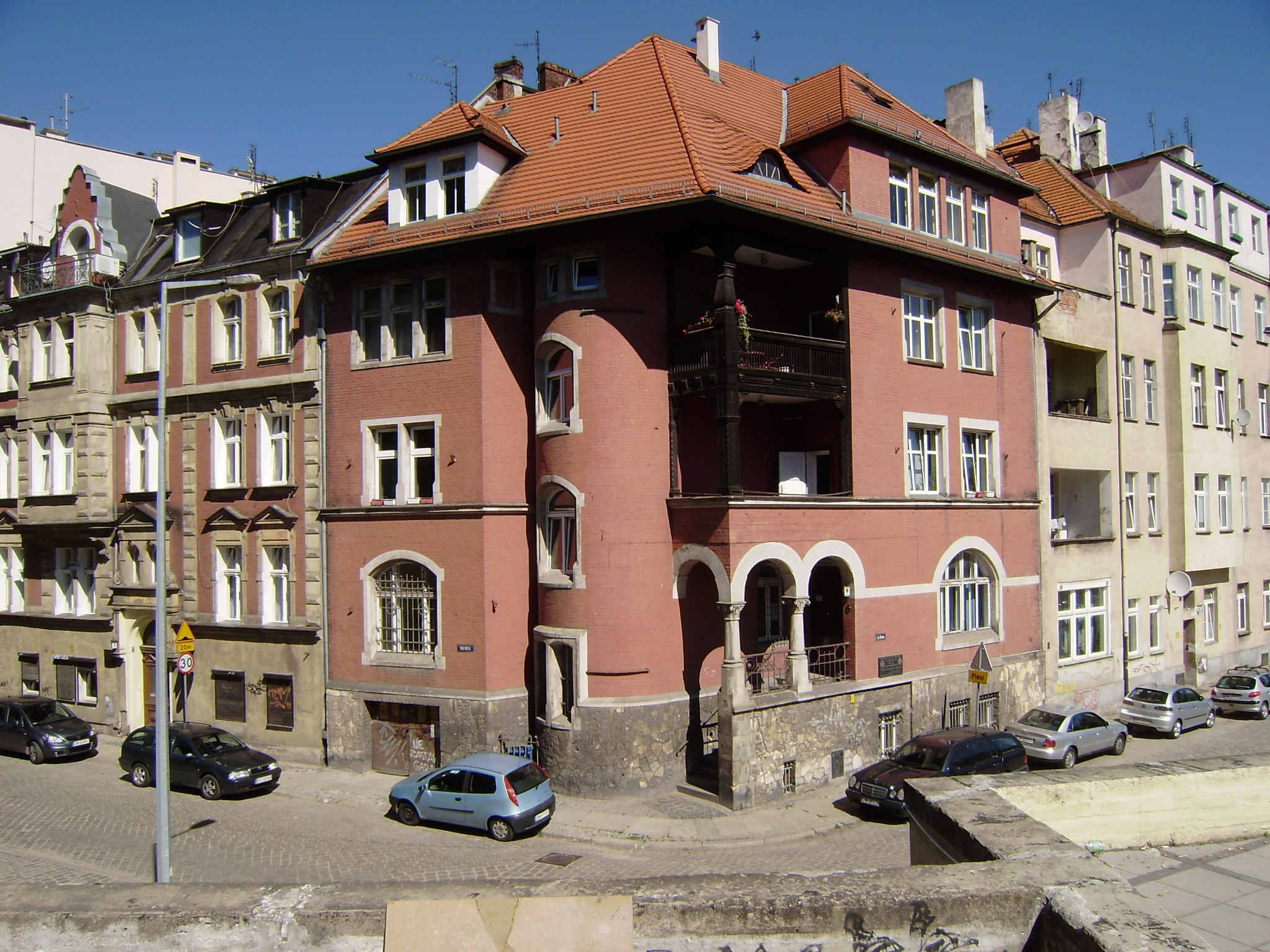 Ehemaliges Corpshaus der Borussia Breslau